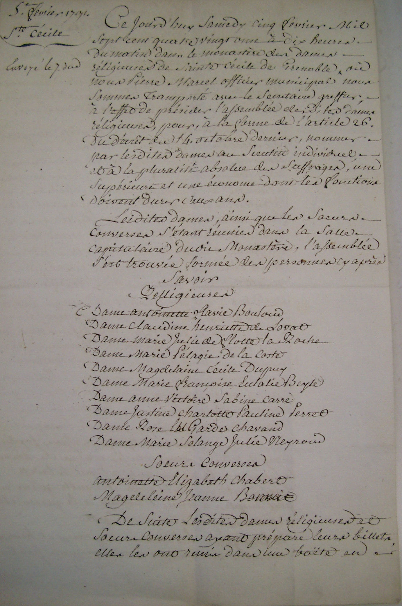 Choix des religieuses de Sainte-Cécile de se maintenir dans leur couvent (1793)